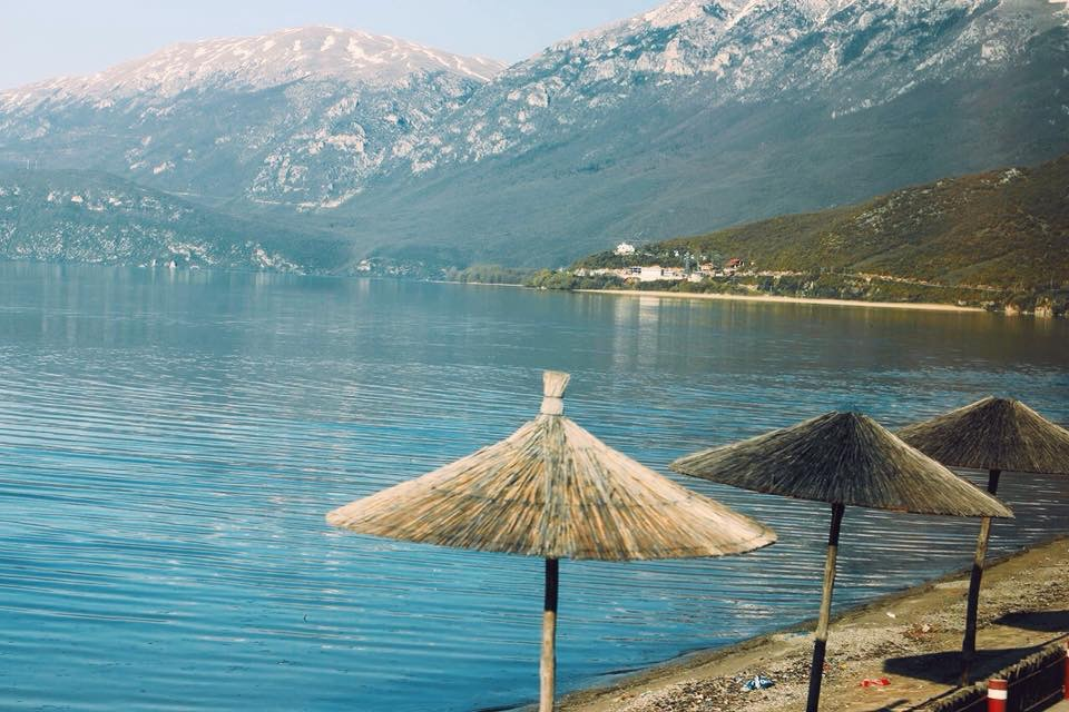 Pogradec, Pogradec